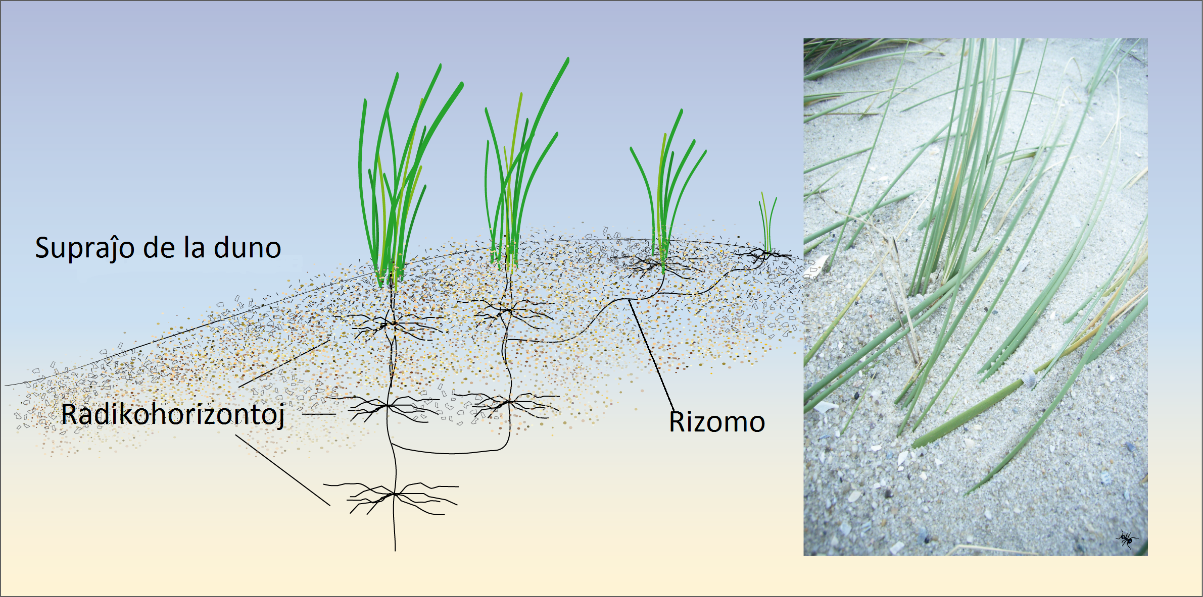 Ammophila arenaria; Wurzelstockwerke in Dünen